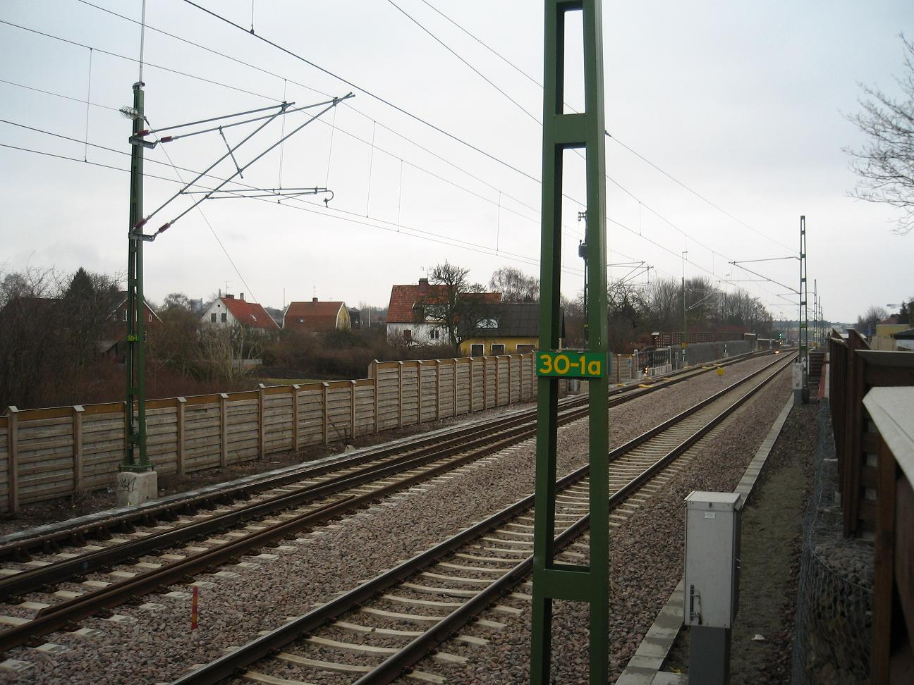 Foto taken by Angriffer, March 31 2006. Västkustbanan in Kobjer, Lund, Sweden.